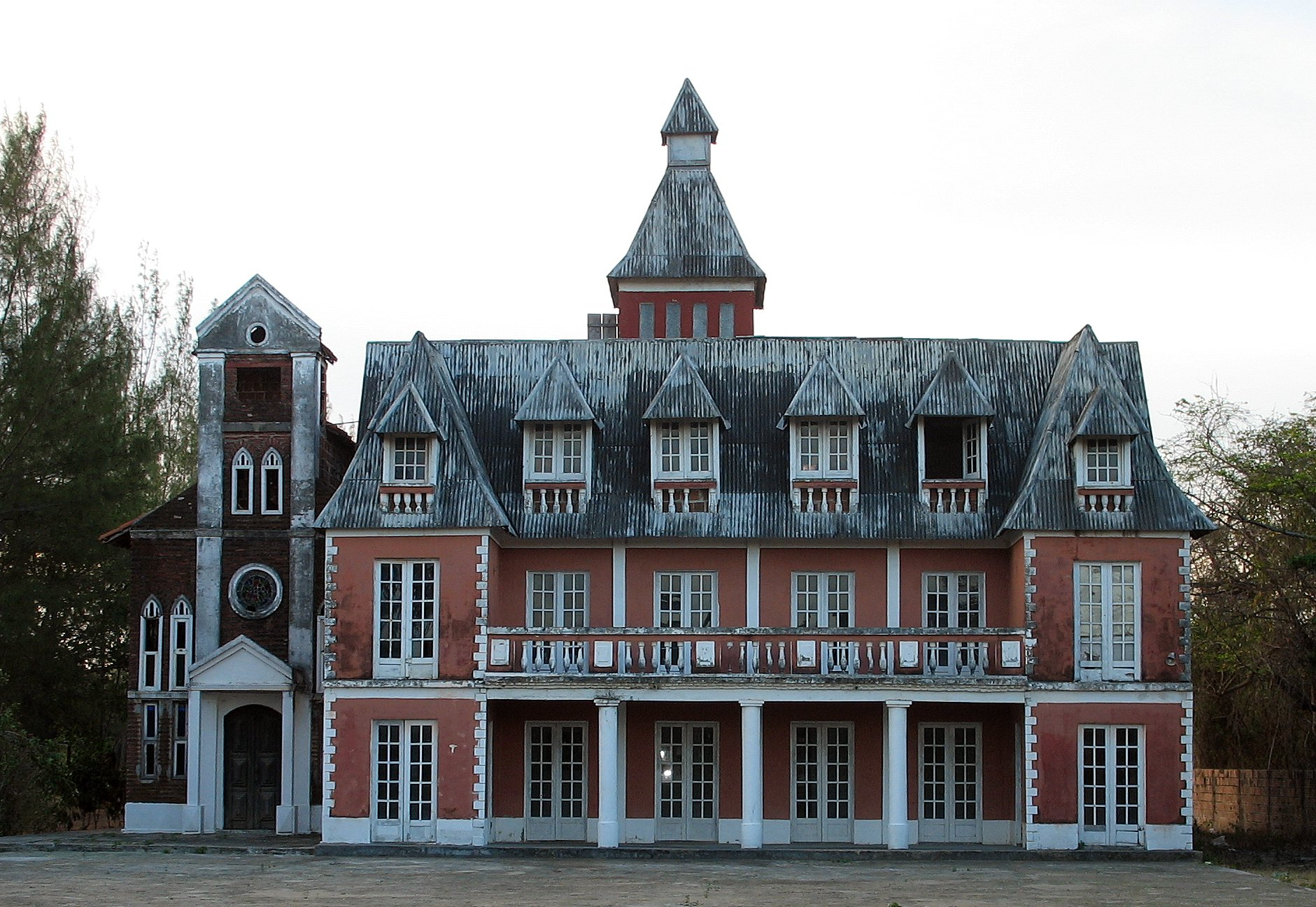 Prédio da Escola de Música do Ancuri.